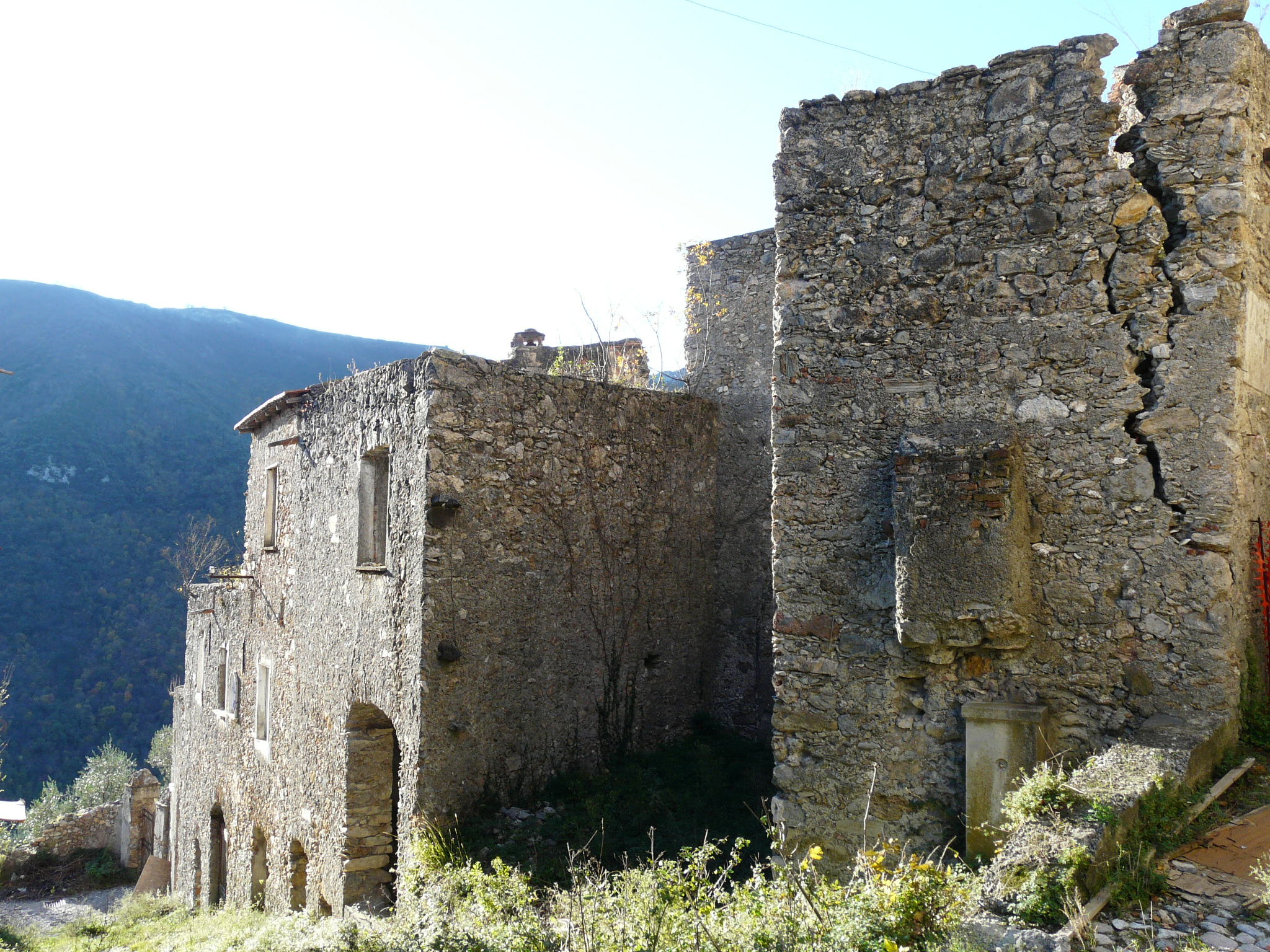 Il borgo abbandonato di Balestrino Vecchia, Liguria, Italia